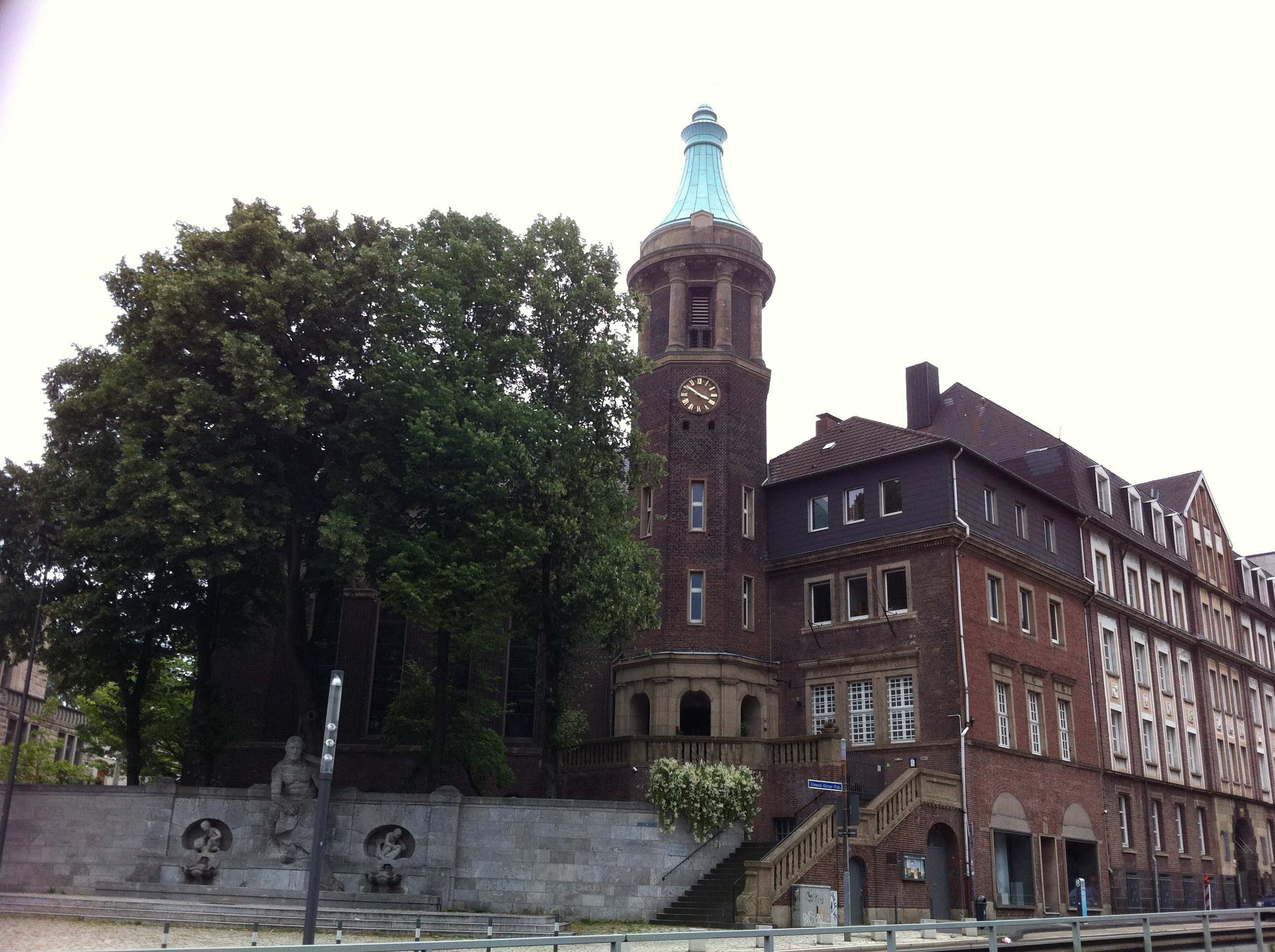 Alt-Katholische Friedenskirche Essen